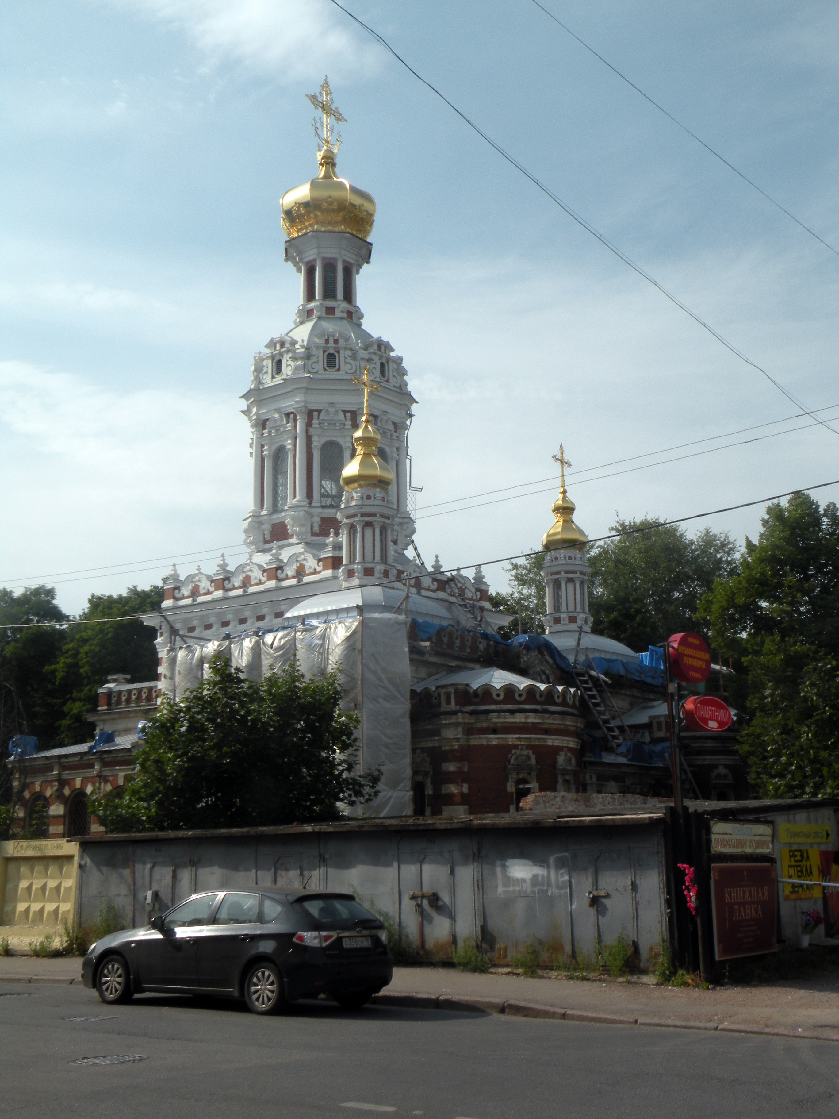 Церковь Рождества Христова у Смоленского кладбища